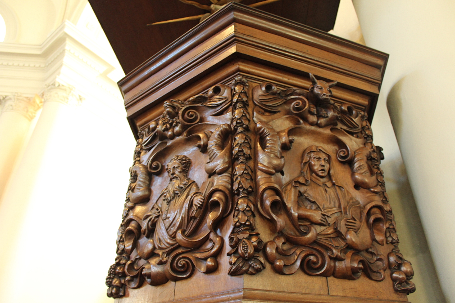 Barokke preekstoel met de afbeelding van de evangelisten op de kuip.